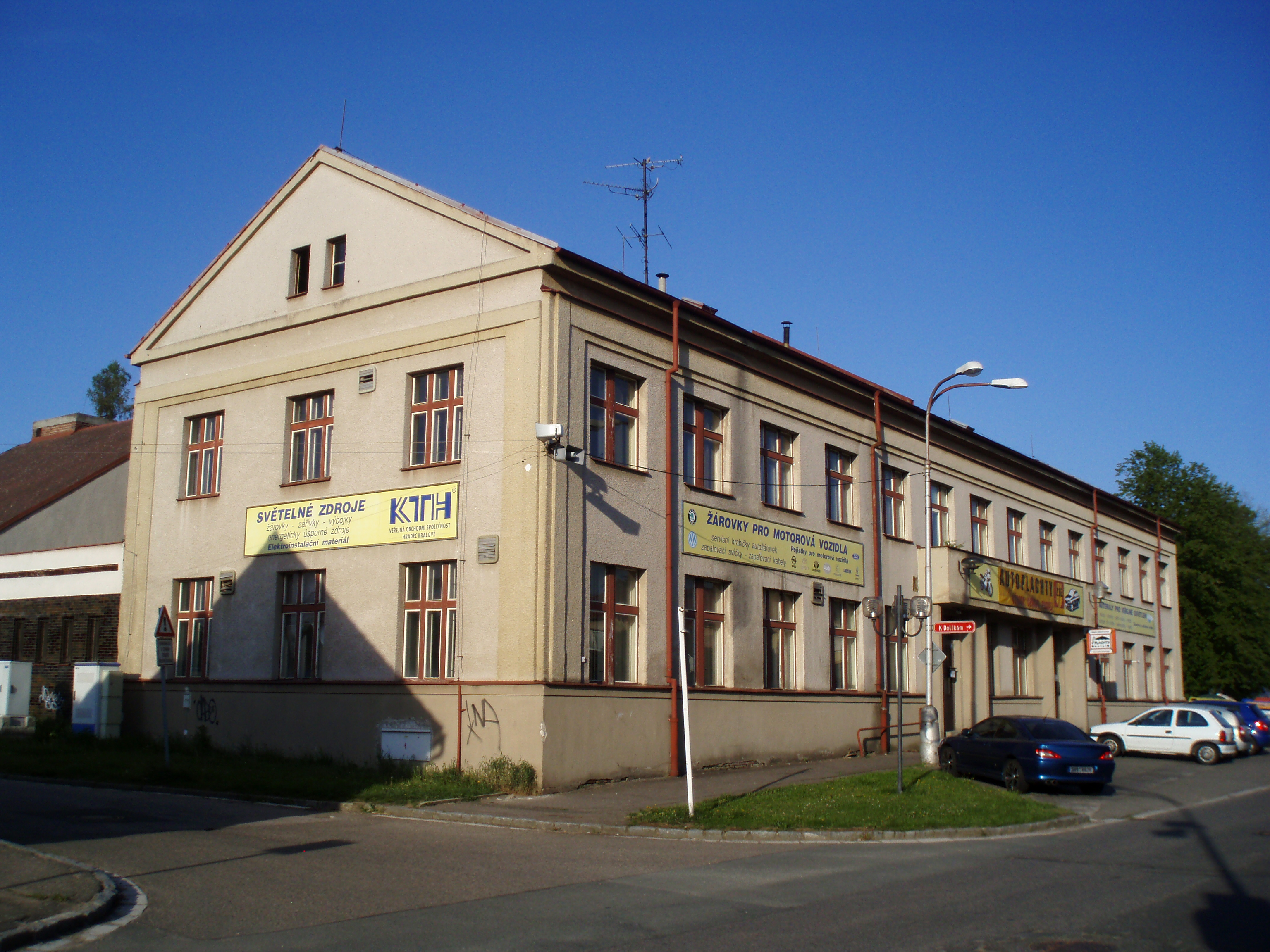 Dělnický dům ve Svobodných Dvorech